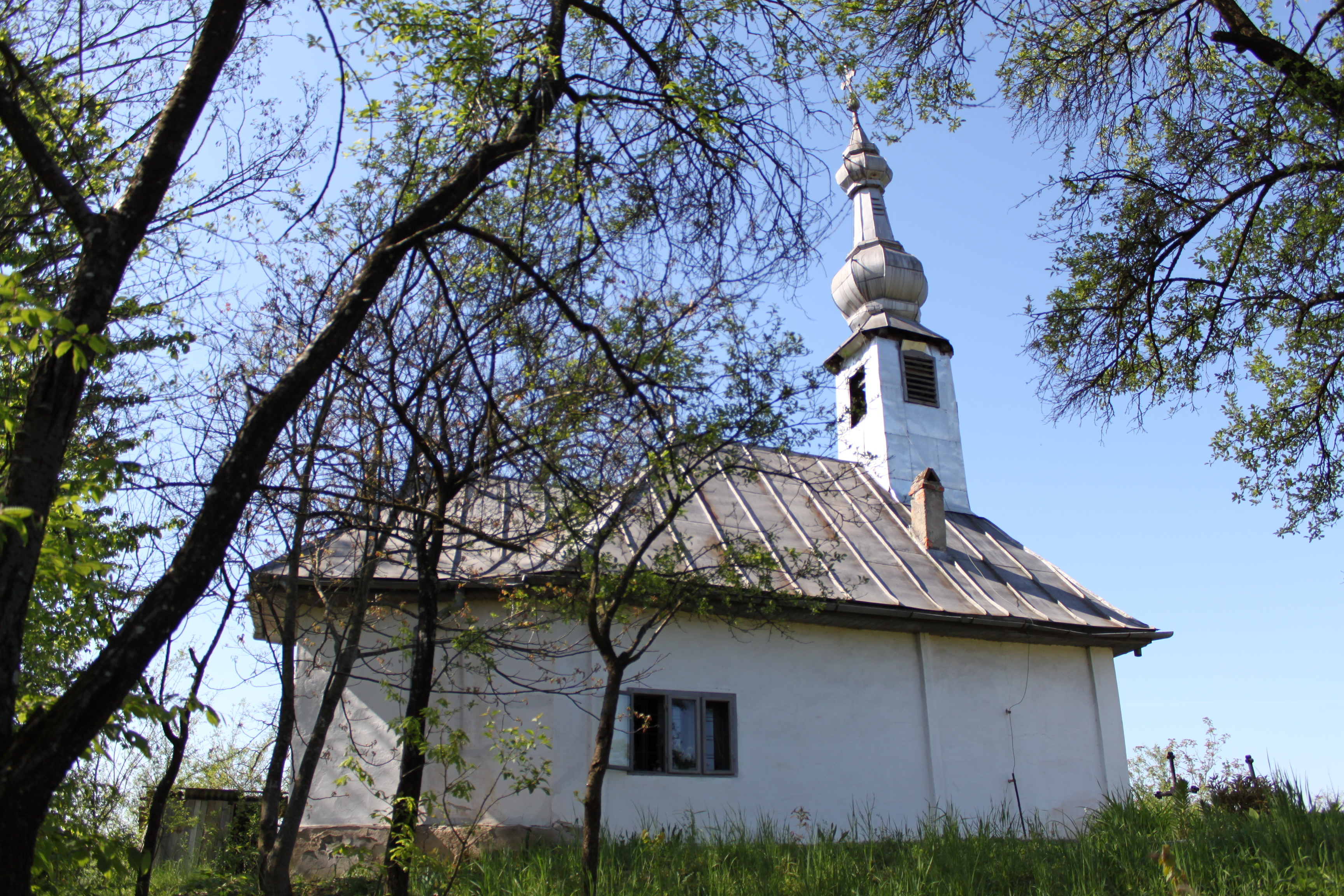 Biserica de lemn din Lunca Sprie, judeţul Bihor.